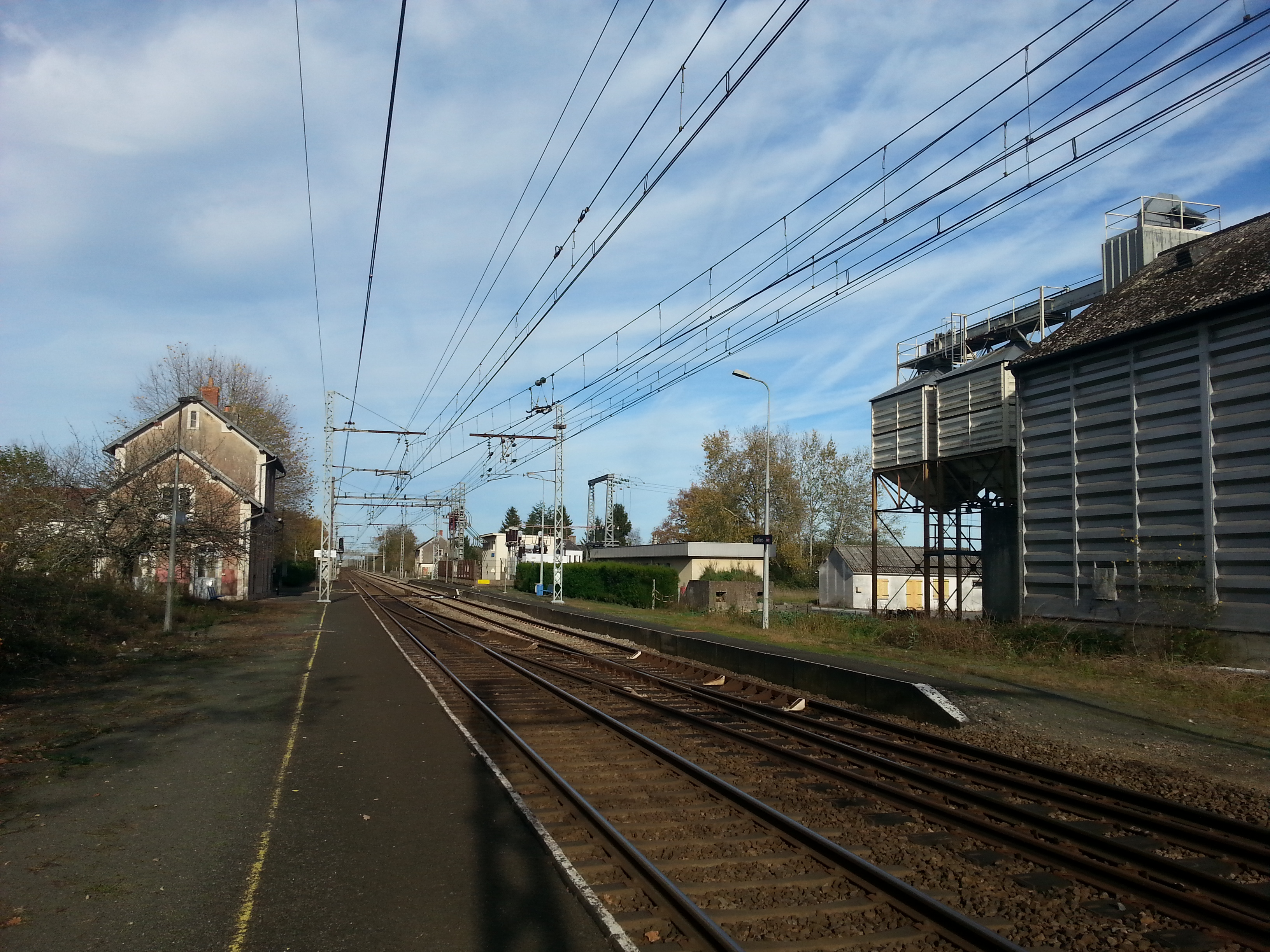 Gare de Lothiers (36) : Vue générale de la gare.